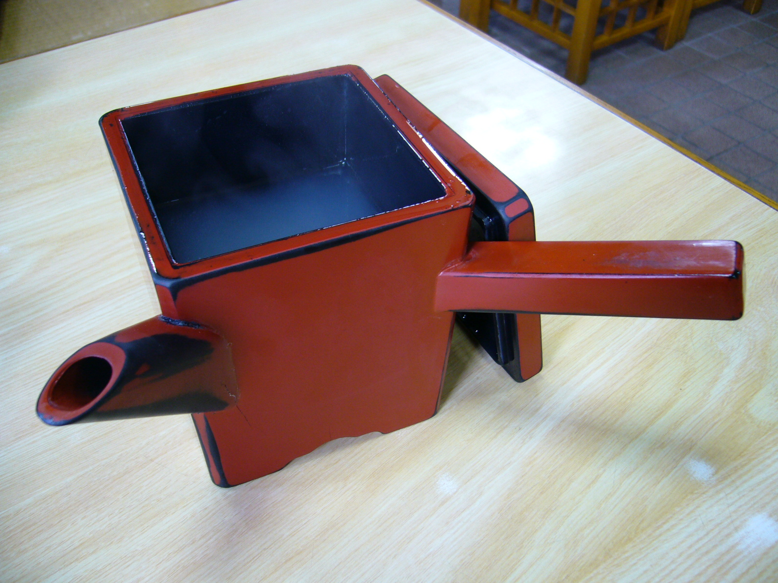 Pail,yutou,soba-yu,katori-city,japan